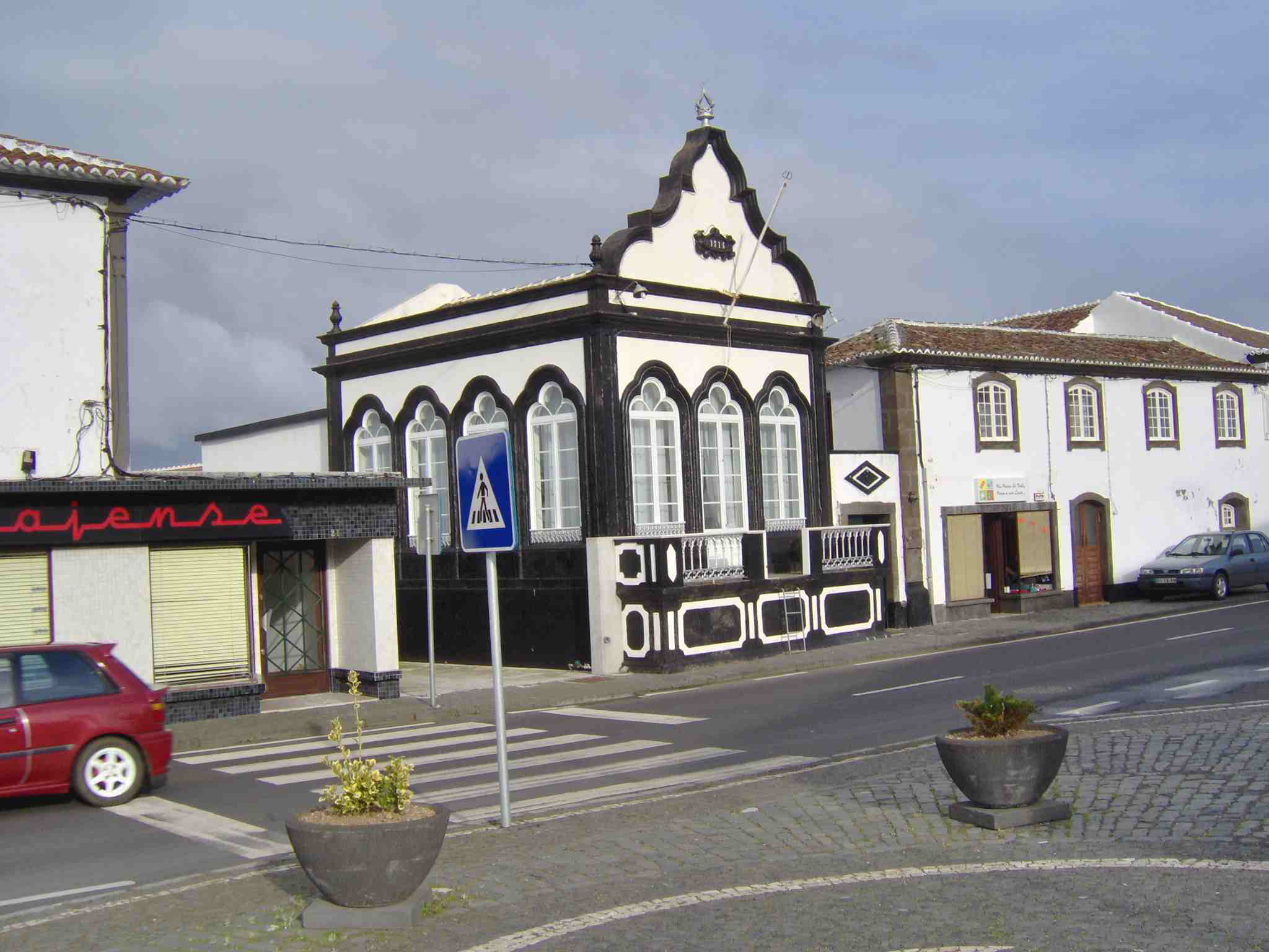 Império do Espírito Santo das Lajes, ilha Terceira, Açores, Portugal